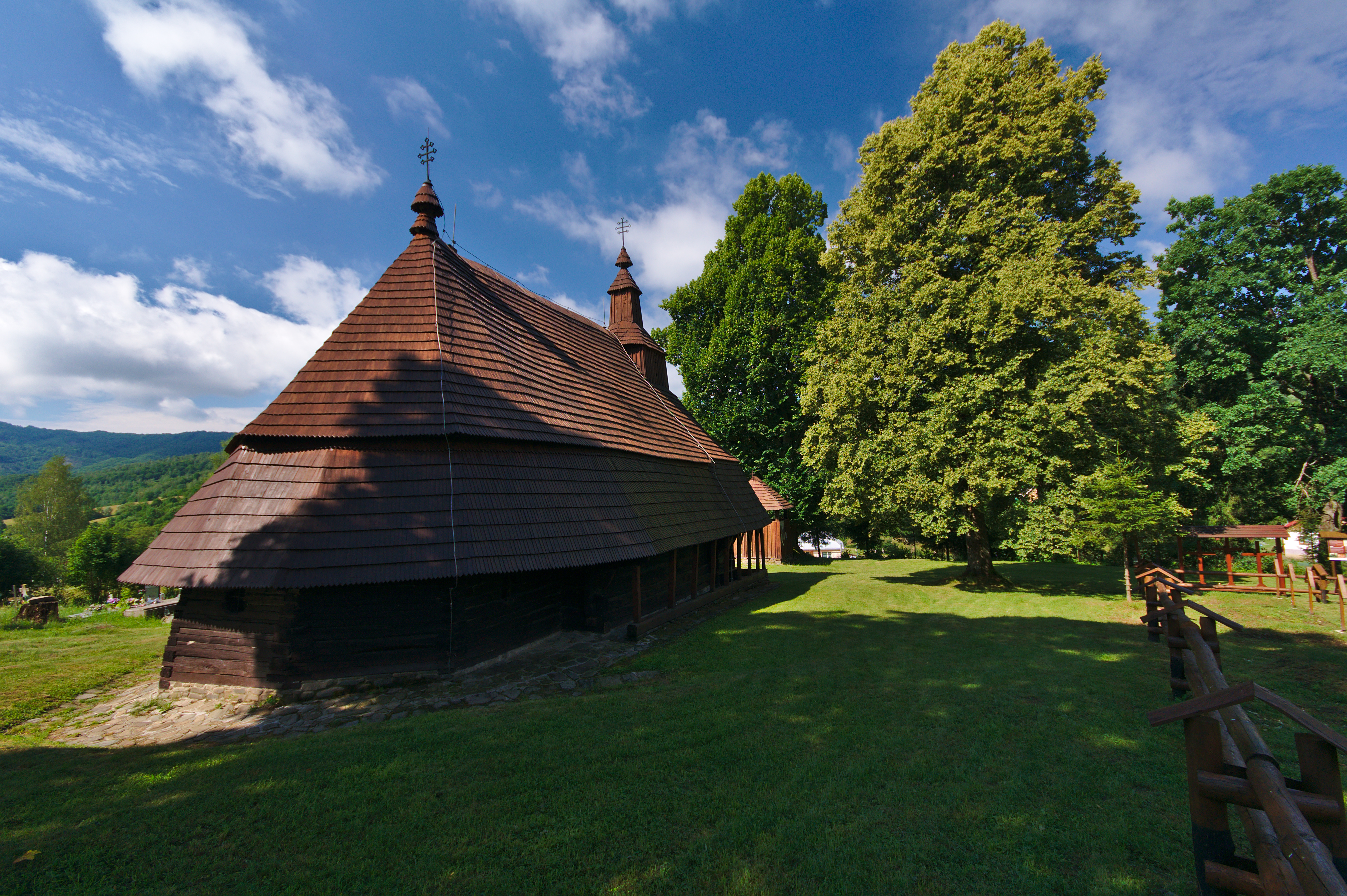 Cerkov svätého Michala archanjela, Topoľa, okres Snina